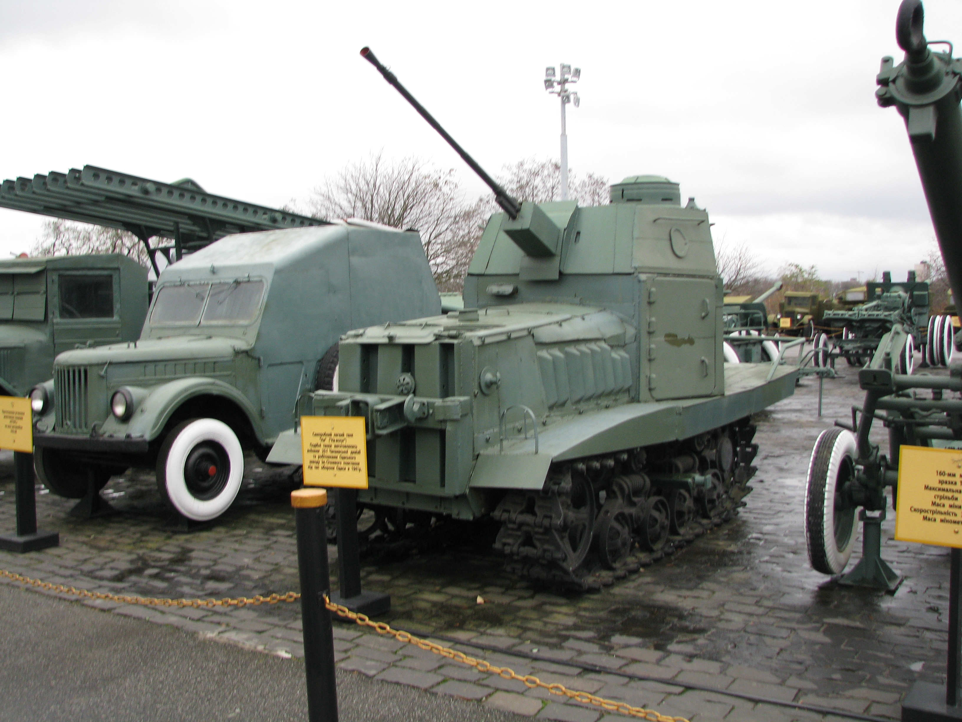 Броне-танк ХТЗ-16